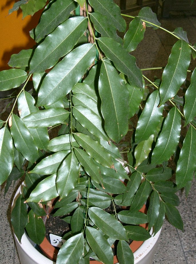 Scientific name Castanospermum australe